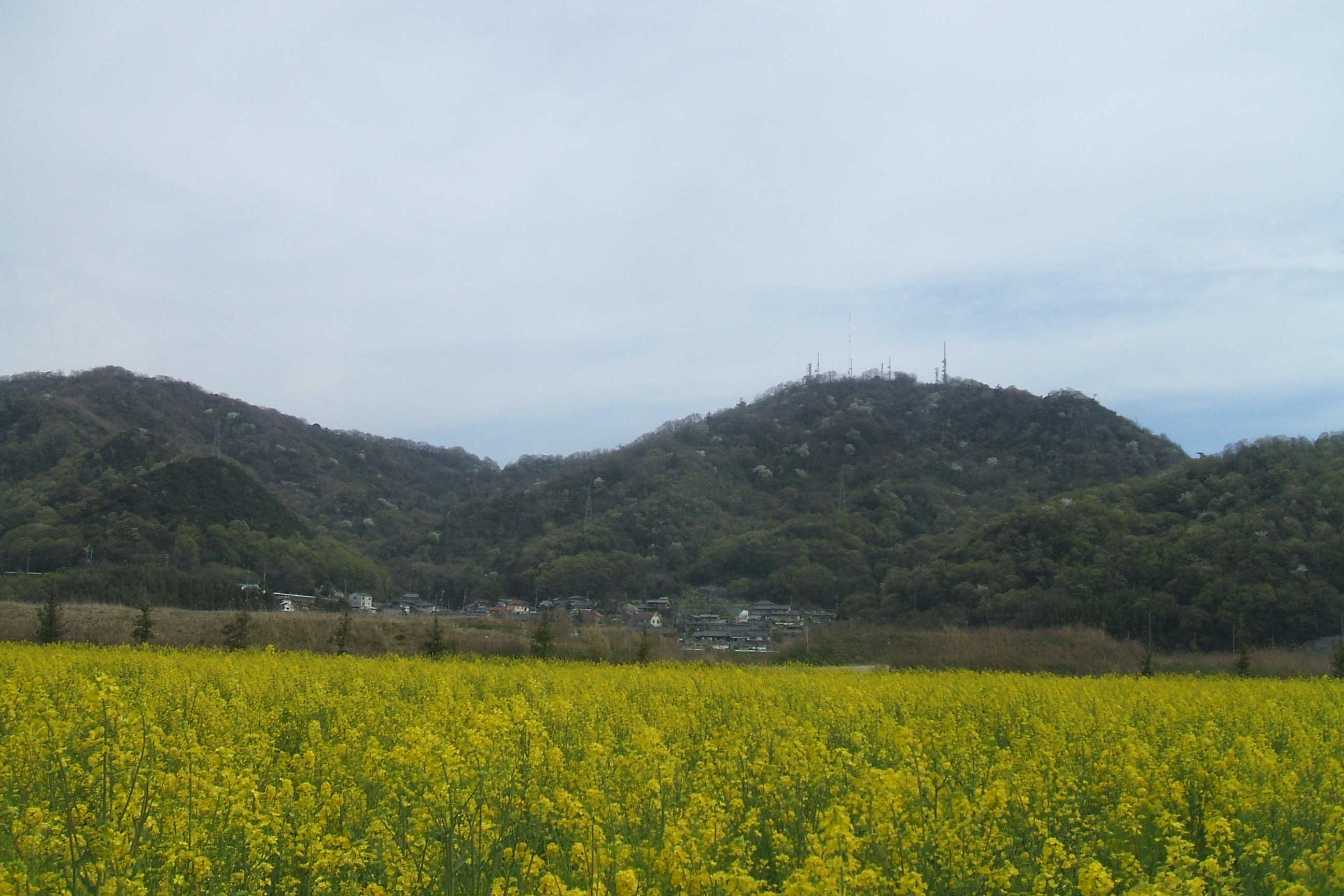 岡山県笠岡市にある笠岡湾干拓地から南にある神島地区の電波塔を望む